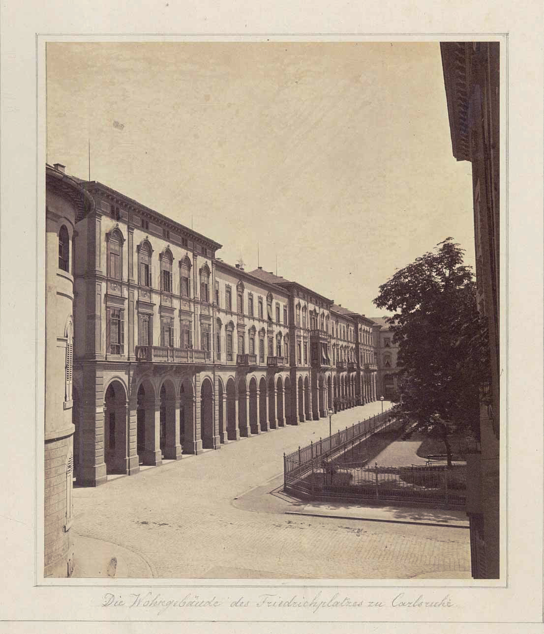 Die Wohngebäude des Friedrichsplatzes zu Carlsruhe. Albuminabzug, 1868. 18,5 x 15,5 cm. Mit Widmung "Seiner lieben Nichte Hermine von Ihrem Onkel Berckmüller dem Erbauer dieser Wohnhäuser. August 1868"